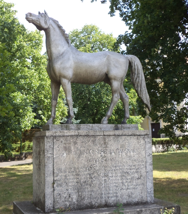 A leghűségesebb bajtársnak szobor Bábolnán